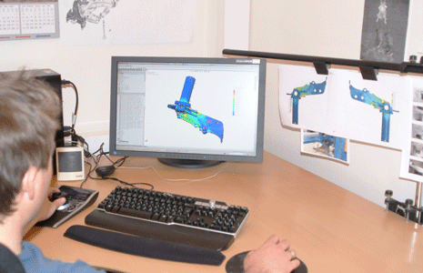 Överums Bruk